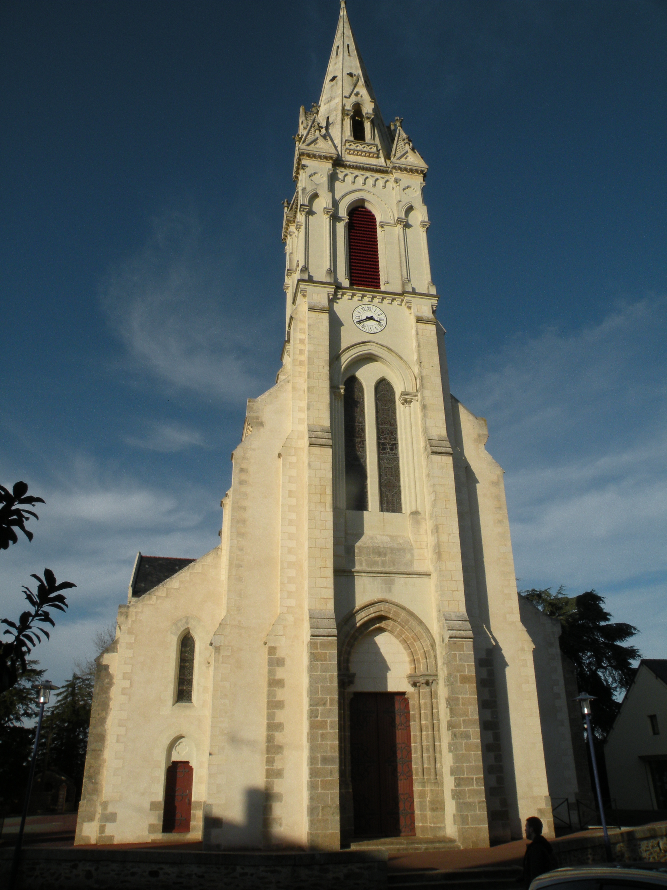 L'église de Fégréac.